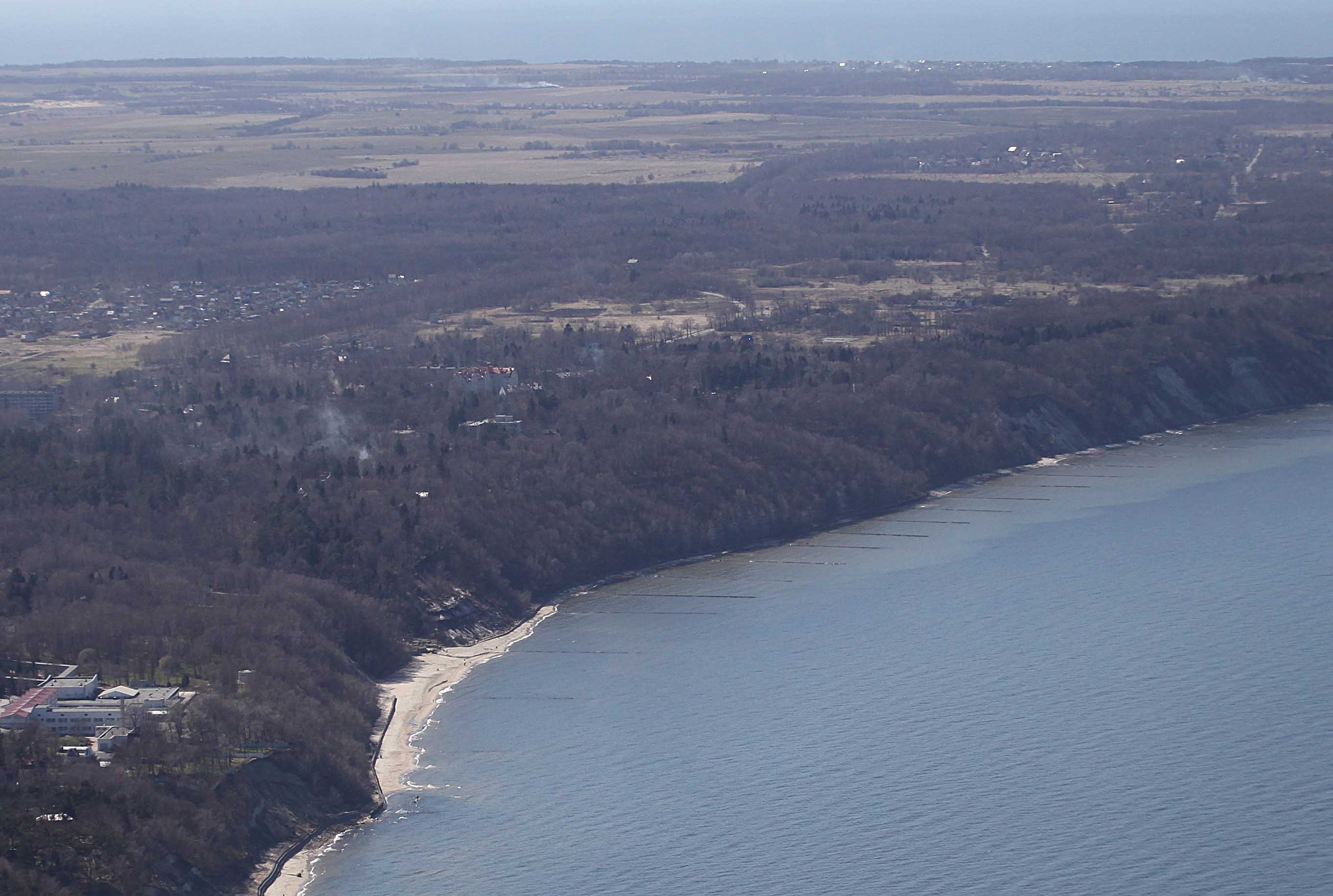 Фотография курорта Отрадное, выполненная В. И. Вороновым в 2009 году с вертолёта и опубликованная в книге Светлогорск. Янтарный курорт России. / Авт.-сост. В. И. Воронов. Вильнюс: Standartu Spaustuve, 2011. — ISBN 978-9555-488-53-8 Invalid ISBN.